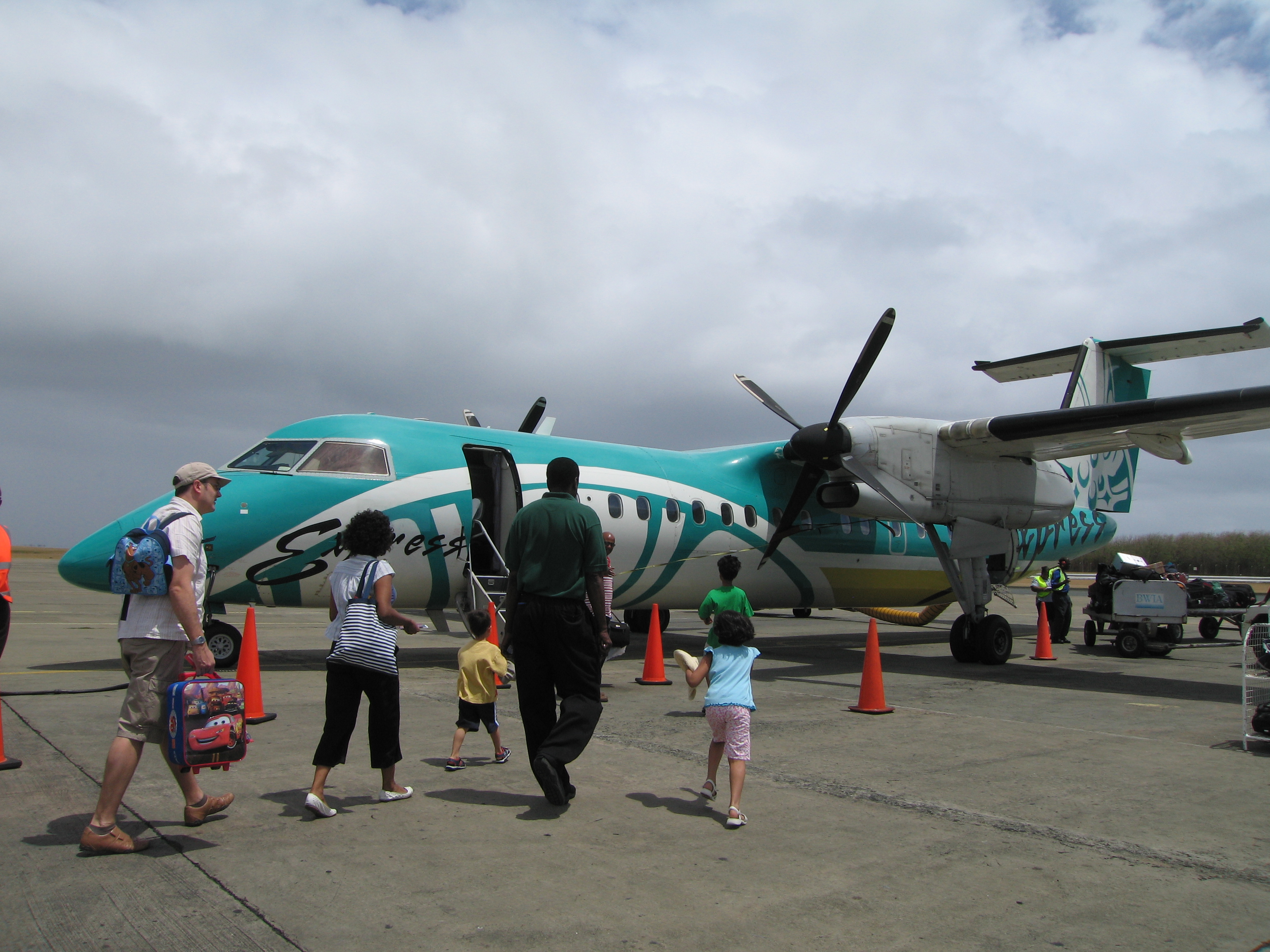 Tobago Express plane